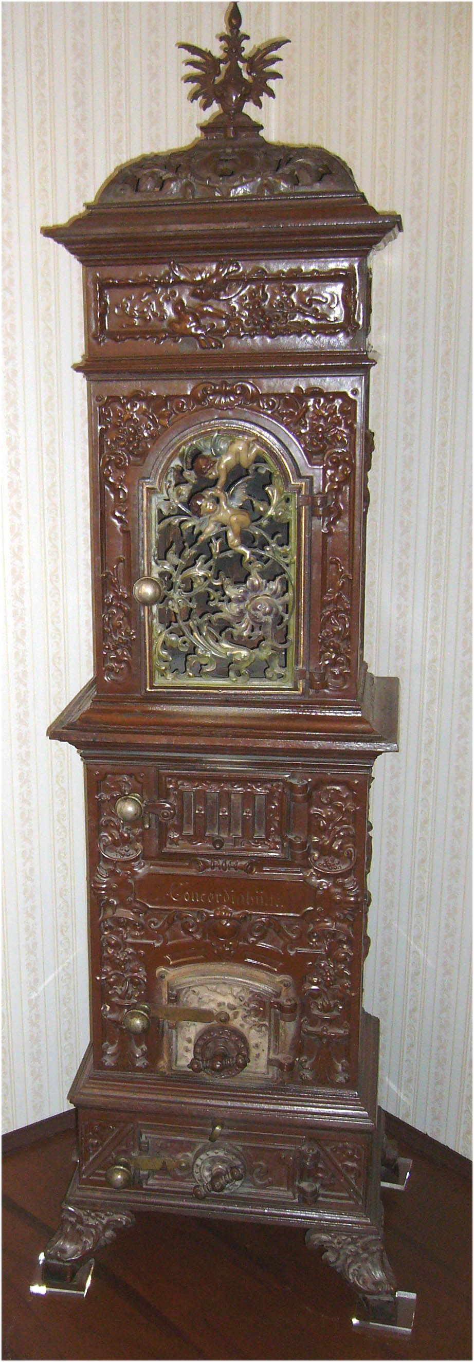 Kunstgussofen der Concordiahütte